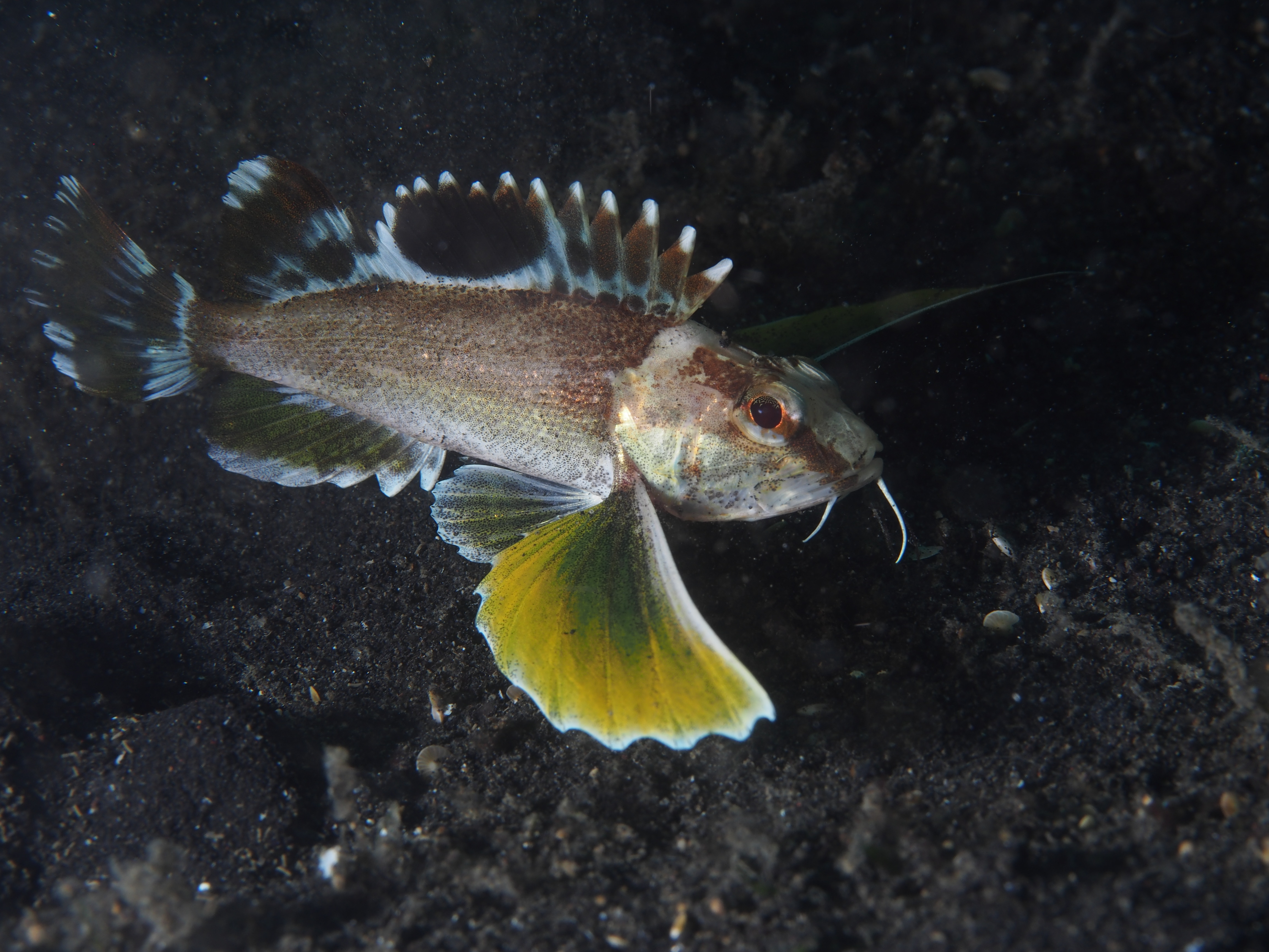 Lembeh, Indonesia - Longfin Waspfish (Apistus carinatus)